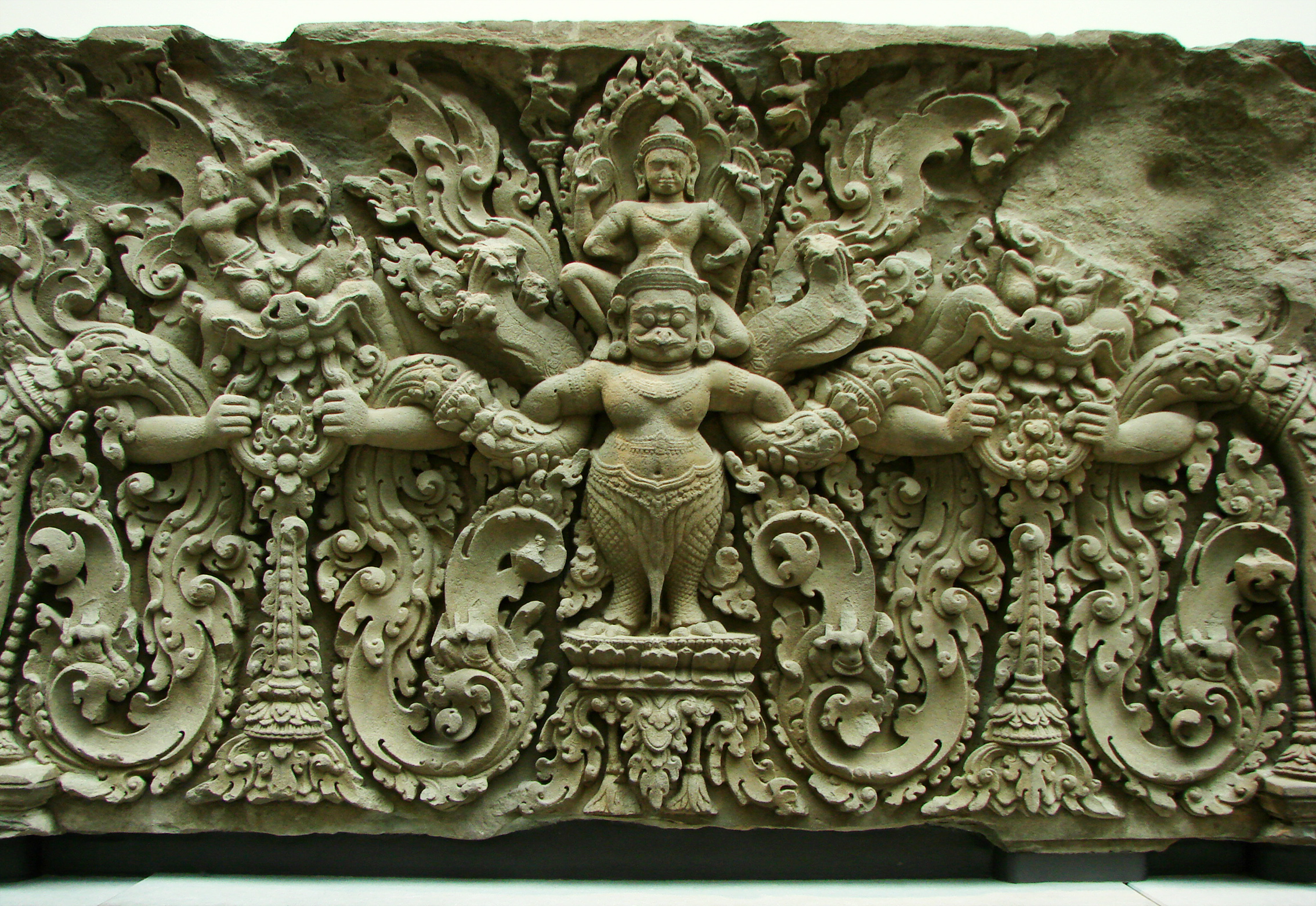 Linteau. Cambodge, Prasat Kok Po A (Angkor), province de Siemreap, style de Preah Ko, fin du 9ème siècle, grès. Vishnou chevauchant Garuda entre deux têtes monstrueuses.